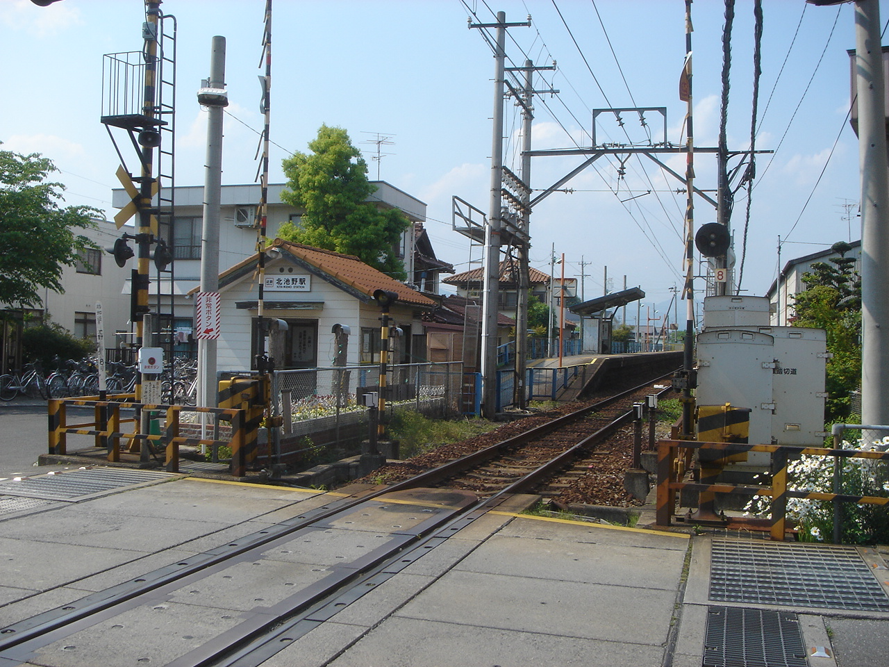 Kita Ikeno Eki(北池野駅),Ikeda,Gifu,Japan(岐阜県池田町)で撮影